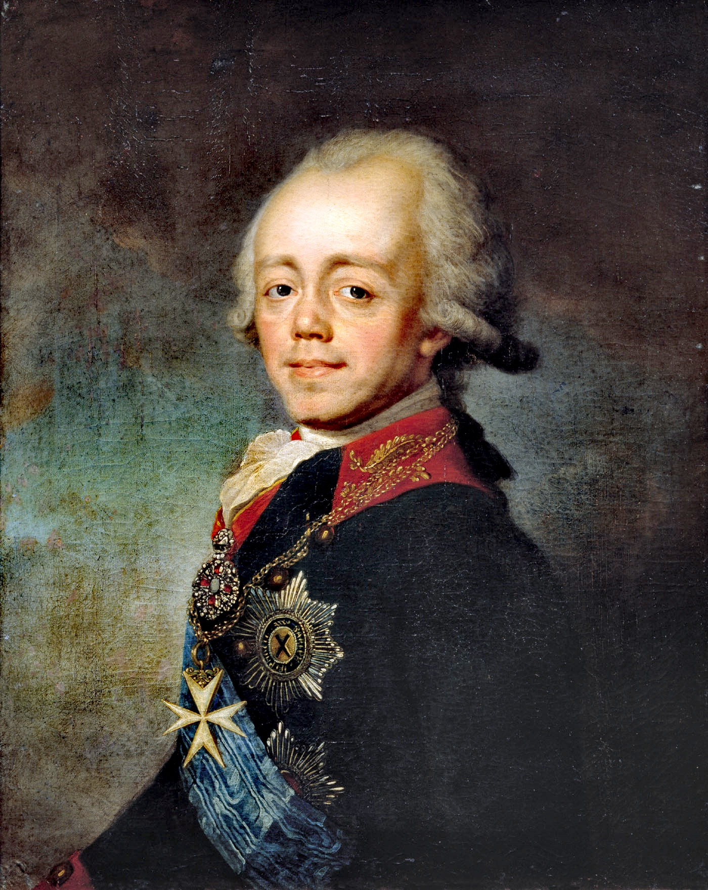 Portrait of Russian Emperor Paul Ilabel QS:Lru,"Портрет Российского Императора Павла I" label QS:Len,"Portrait of Russian Emperor Paul I"